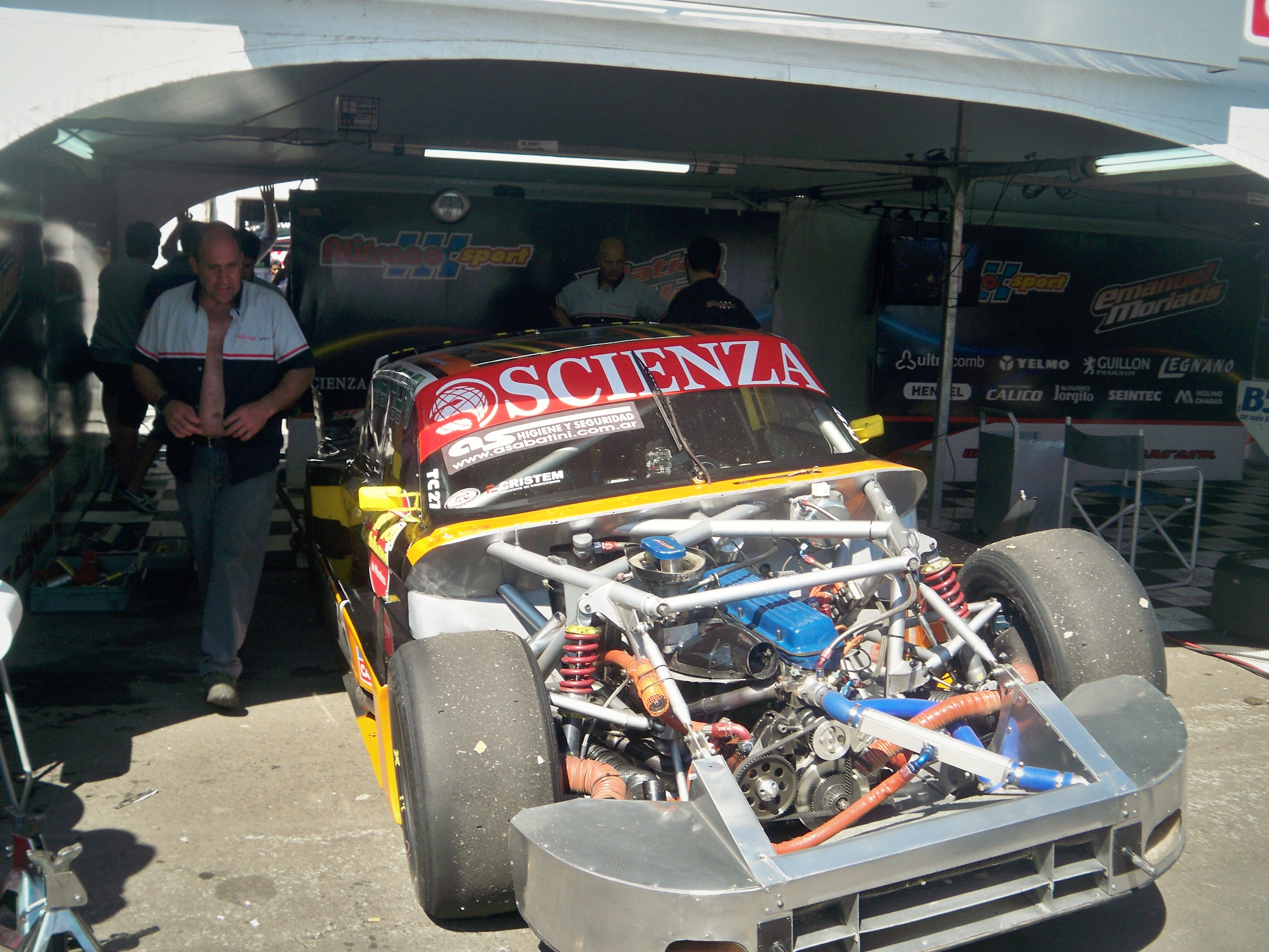 Ford Falcon de Matías Jalaf de Turismo Carretera, en el box del Alifraco Sport, en Paraná 2013.